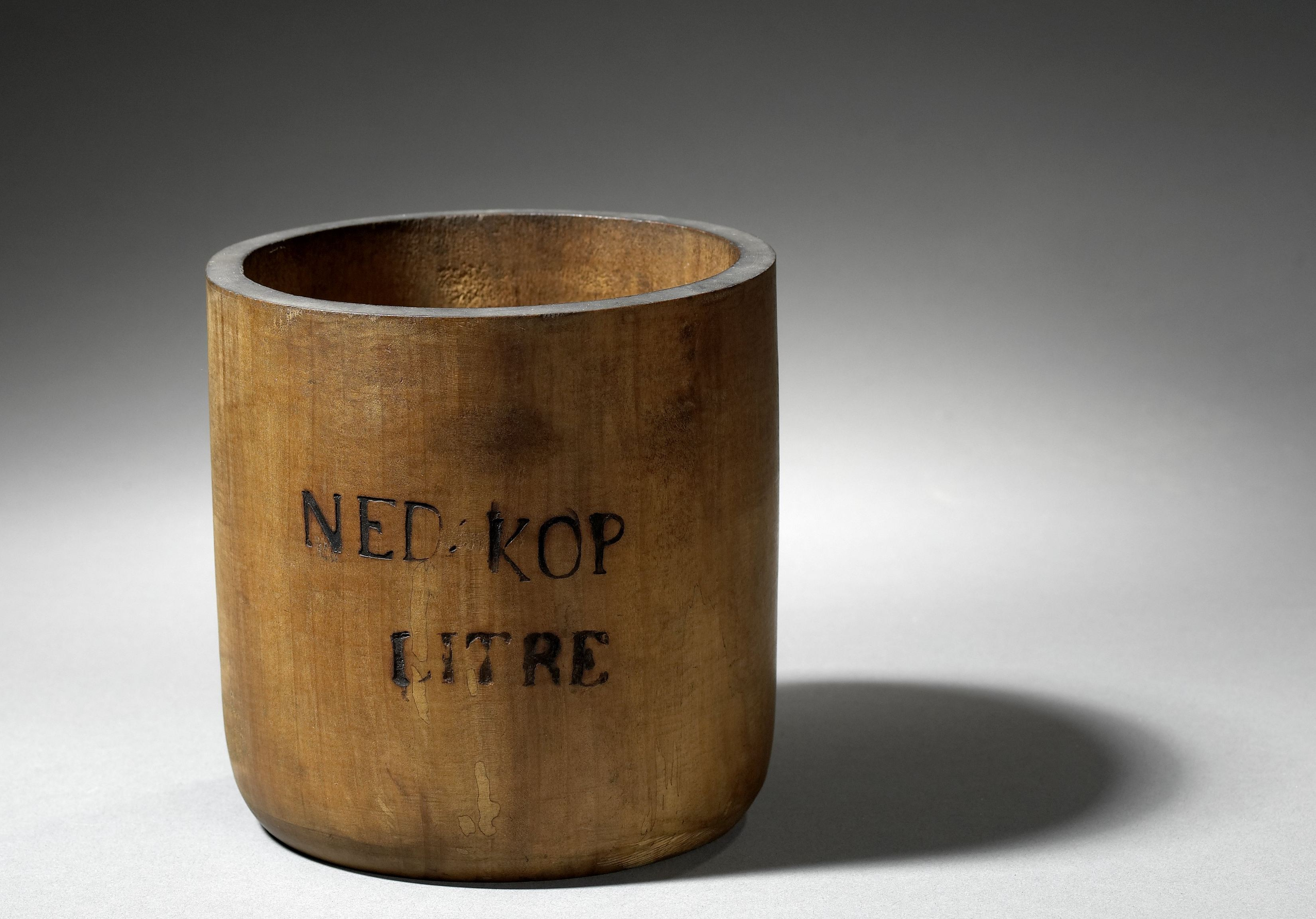 IdentificatieTitel(s): Inhoudsmaat van 1 NED KOPObjecttype: inhoudsmaat droge waren Objectnummer: NG-2001-16-A-74Omschrijving: Gedraaid houten inhoudsmaat van 1 liter.VervaardigingVervaardiger: anoniemPlaats vervaardiging: NederlandDatering: ca. 1825Materiaal: hout Techniek: draaiend bewerkenAfmetingen: h 12,5 cm. × d 12,3 cm. OnderwerpWanneer: 1780 - 1830Waar: NederlandVerwerving en rechtenVerwerving: overdracht van beheer 26-nov-2001Copyright: Publiek domein